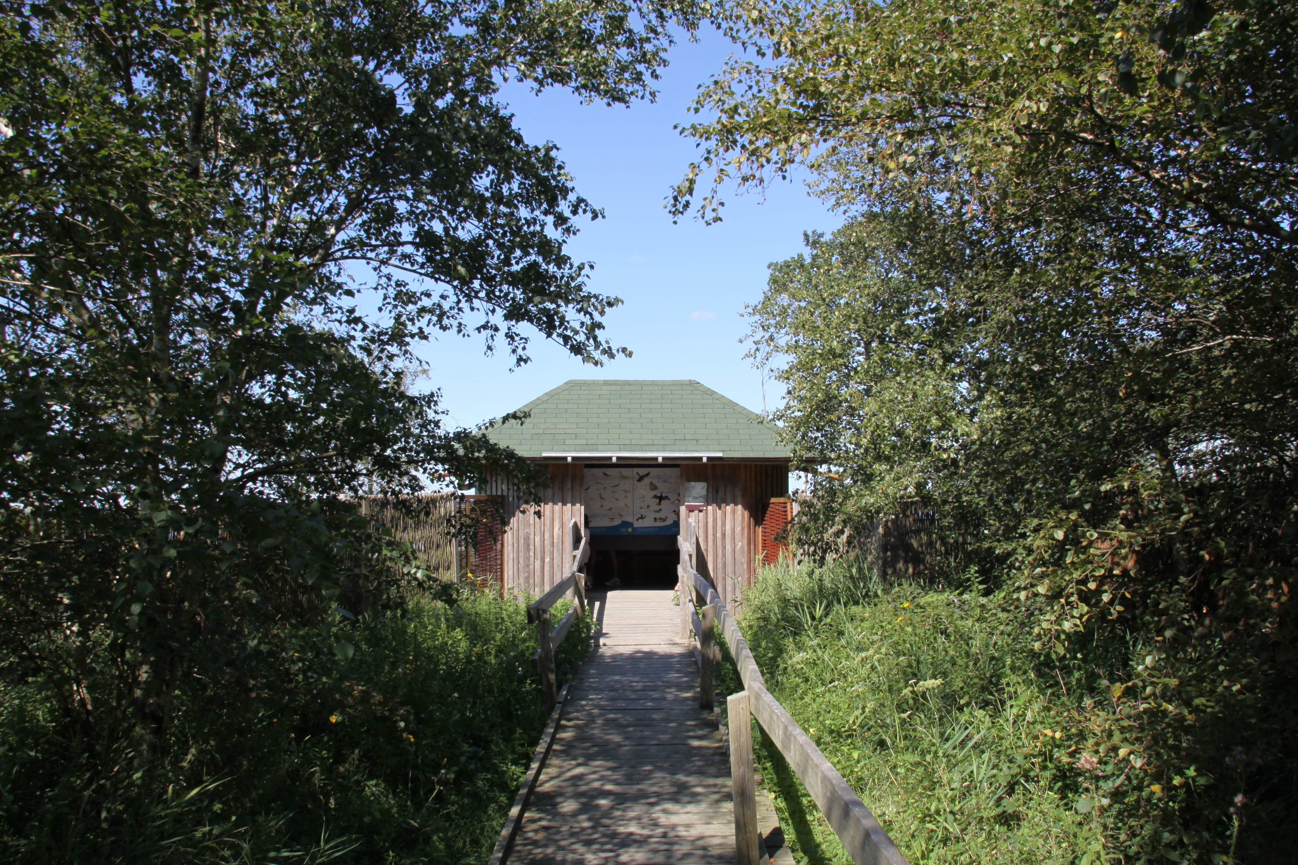 Vogelbeobachtungshütte im Schwimmenden Moor von Sehestedt